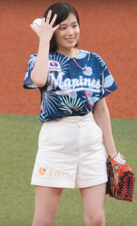 筧美和子です。